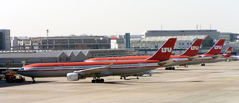 Airbus A330 der LTU (Original text: Drei Airbus A330 und ein A320 der LTU am Flughafen Düsseldorf am 13. März 2003.) Andere Versionen